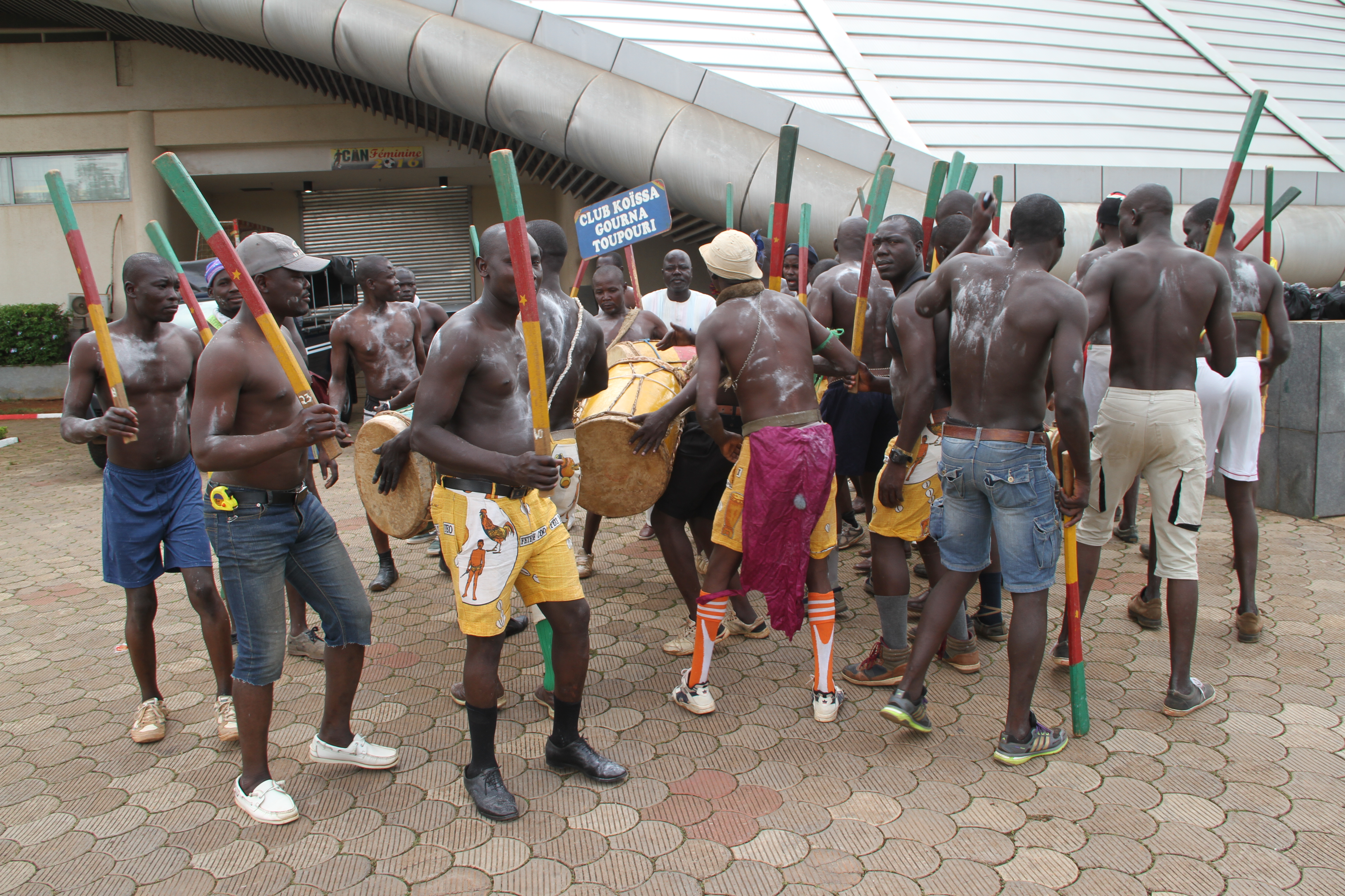 Groupe de danse toupouri du nord du Cameroun présentés lors du Fenac (Festival National des Arts et de la Culture) à Yaoundé au Cameroun This is an image from Cameroon